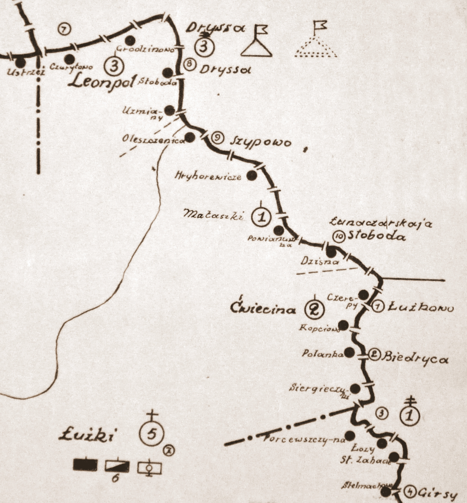 Szkic rozmieszczenia batalionu KOP Łużki w 1931